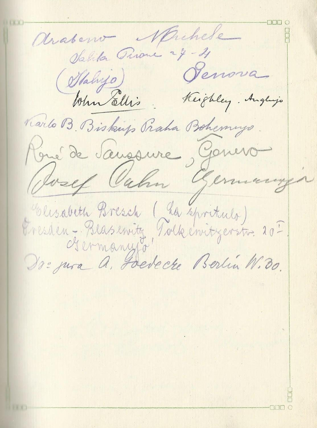 Subskriboj de diversaj esperantistoj, 1911